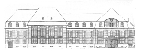 Königliche Eisenbahndirektion Köln, Nebengebäude